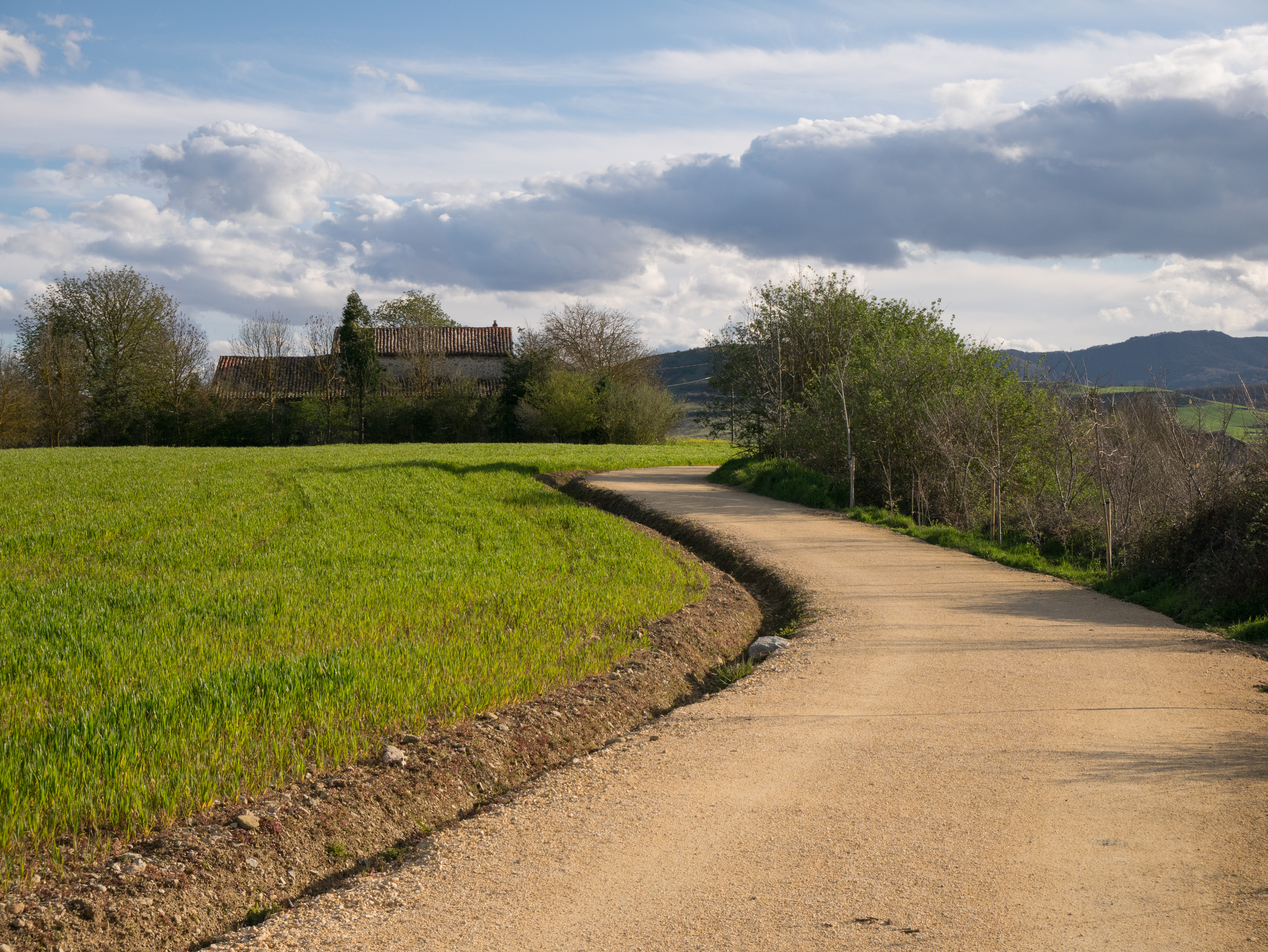 Caserío en Puente Alto. Vitoria-Gasteiz, País Vasco, España